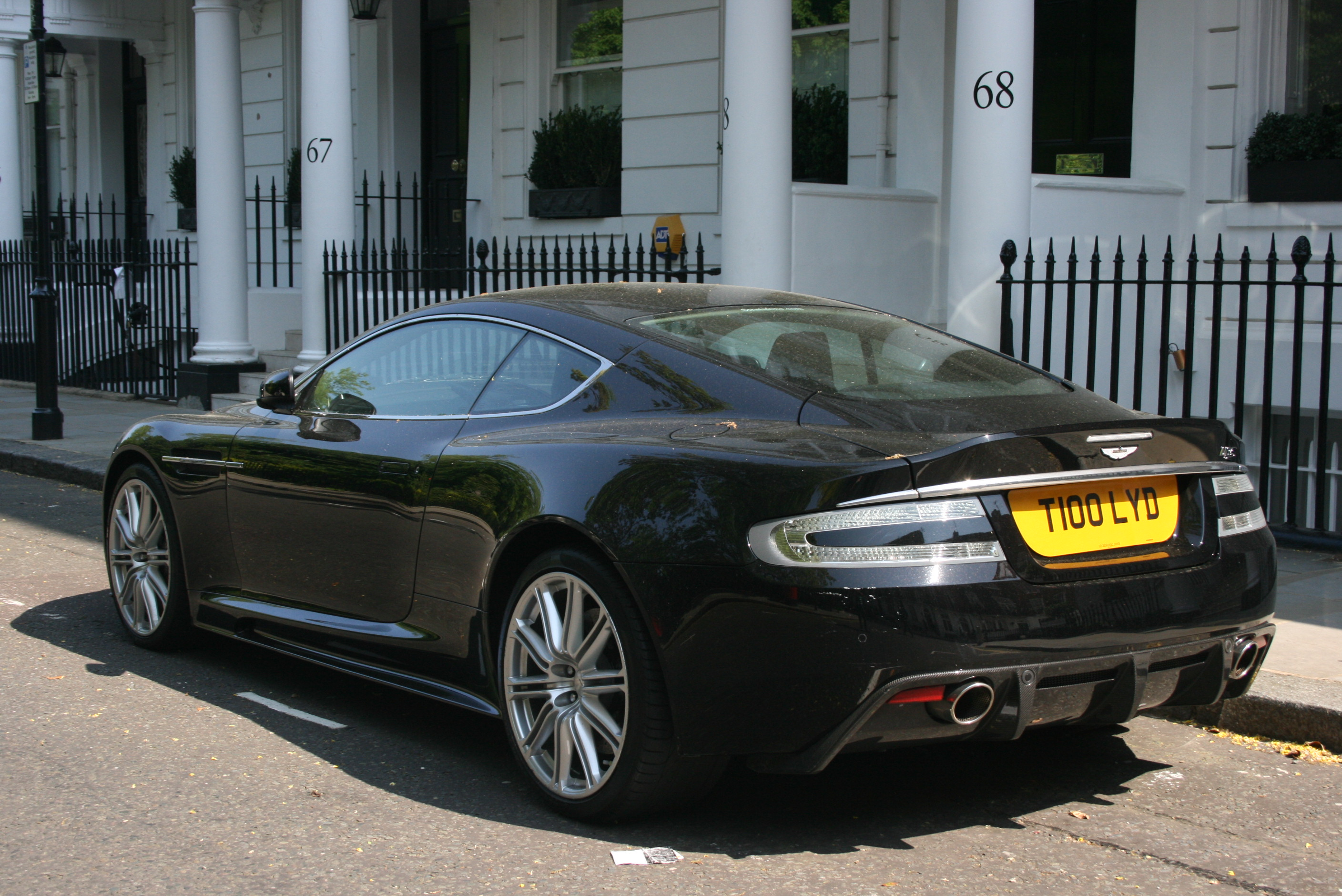 Aston Martin, Cadogan Place